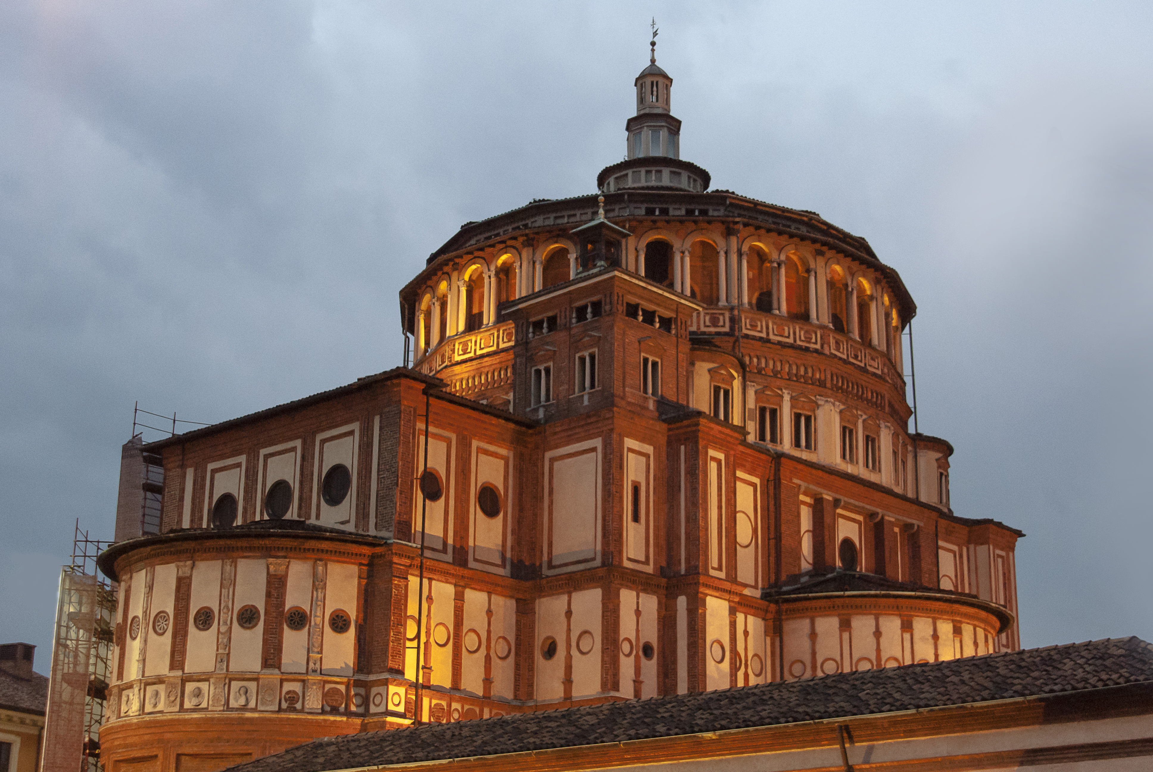 Kościół Santa Maria delle Grazie w Mediolanie (Włochy)